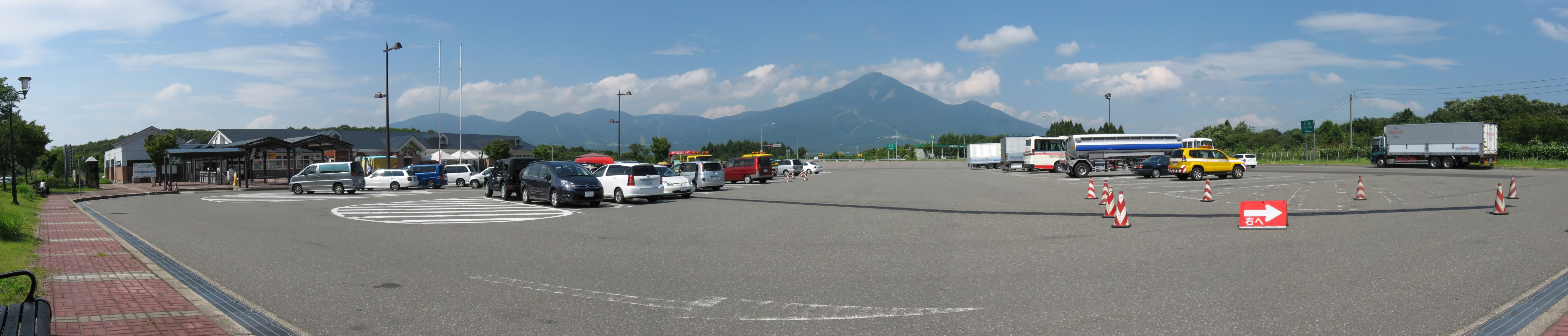 磐梯山SA。